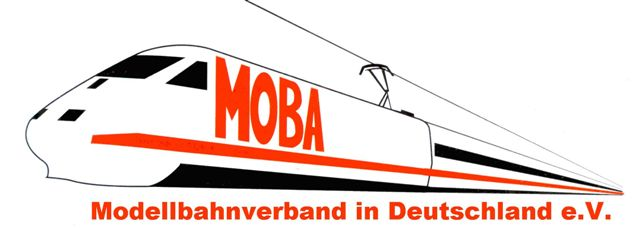 Logo des Modellbahnverband in Deutschland.